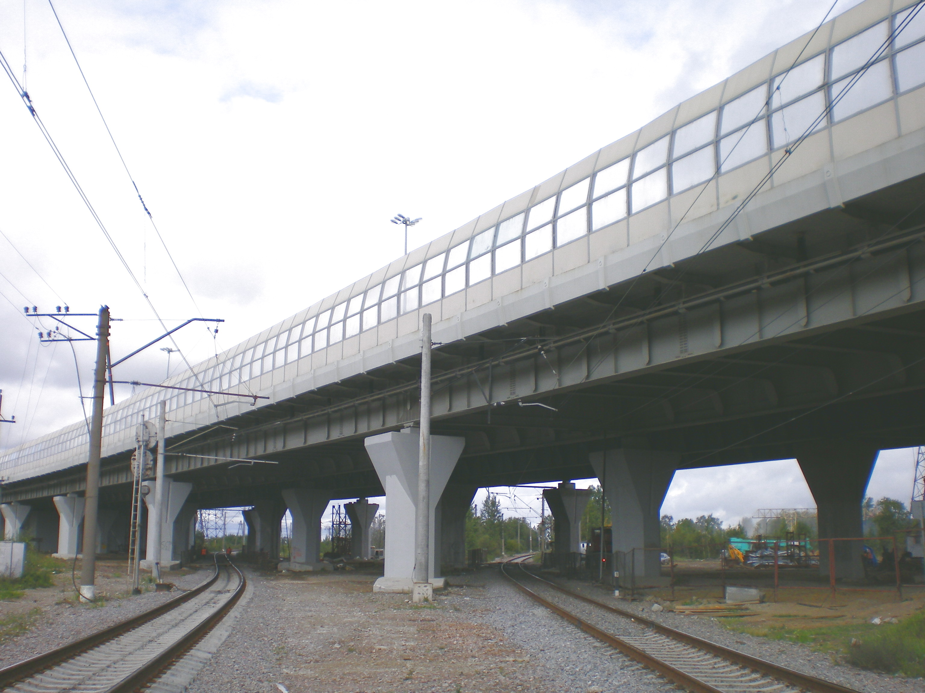 Кад над Приозерским направлением Октябрьской железной дорогой